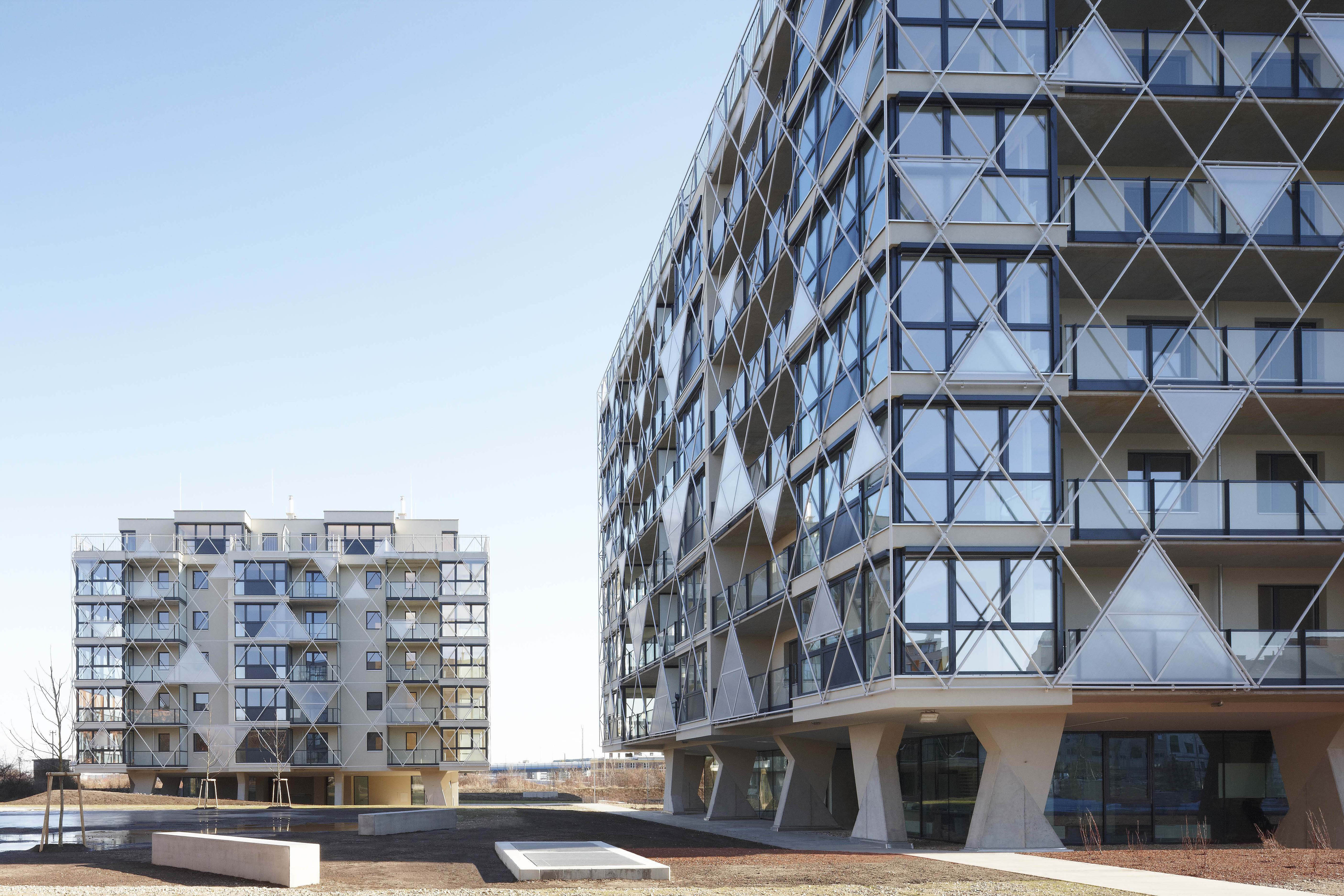 Wohnhausanlage Karree St. Marx Erne-Seder-Gasse 8, 1030 Wien